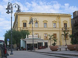 Palazzo comunale, Ribera, Agrigento, Sicilia